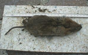 Diese Schermaus ist ohne Schwanz 16cm lang, und mit Schwanz 25cm. Das Foto zeigt das tote Tier, welches etwa zwei Tage zurückliegend in eine typische Wühlmausfalle getappt ist. Am Rückenfell, hinter dem Kopf, sind noch die Spuren des Eisens zu sehen.